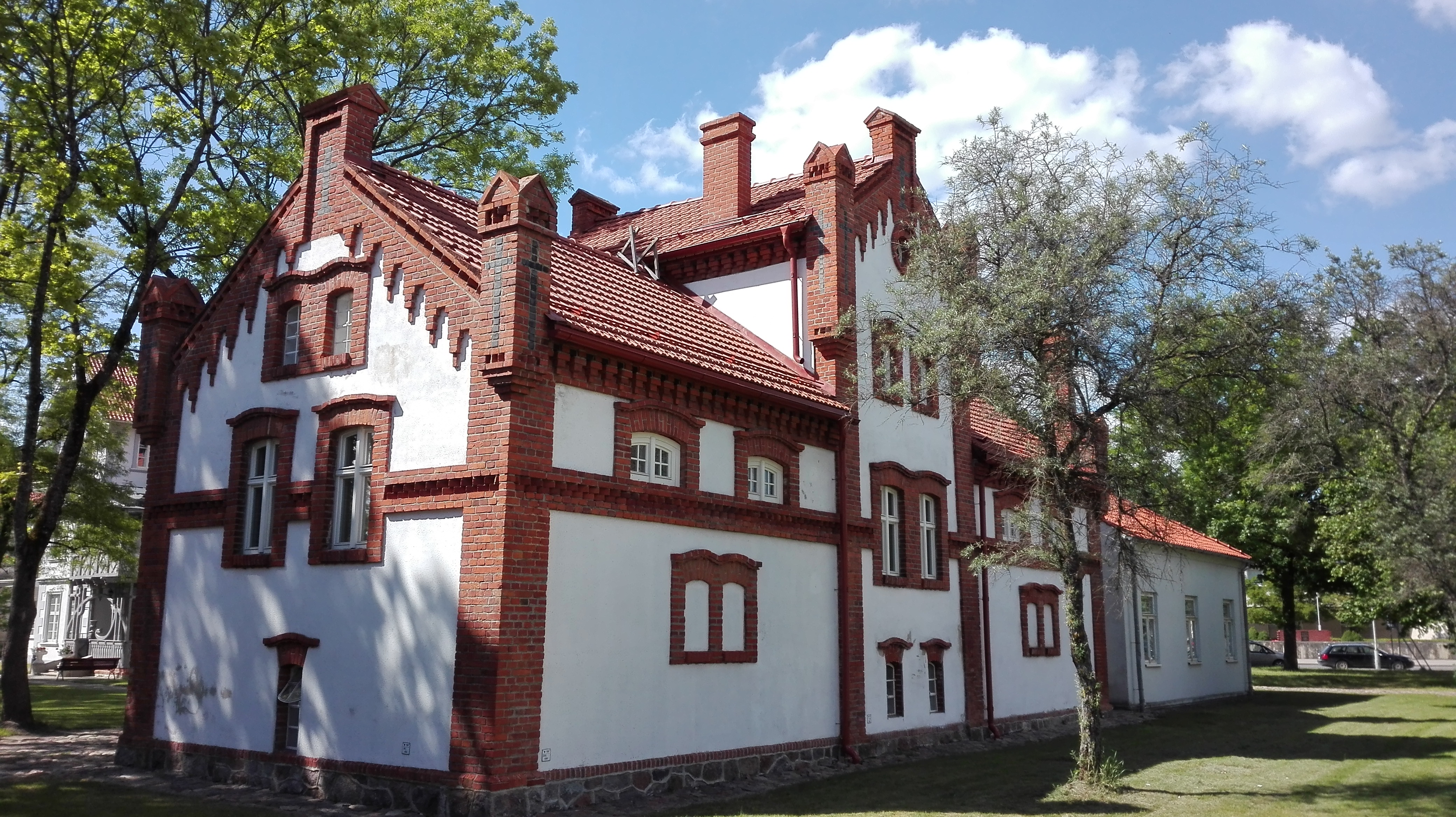 Vienas iš Hugo Šojaus dvaro pastatų